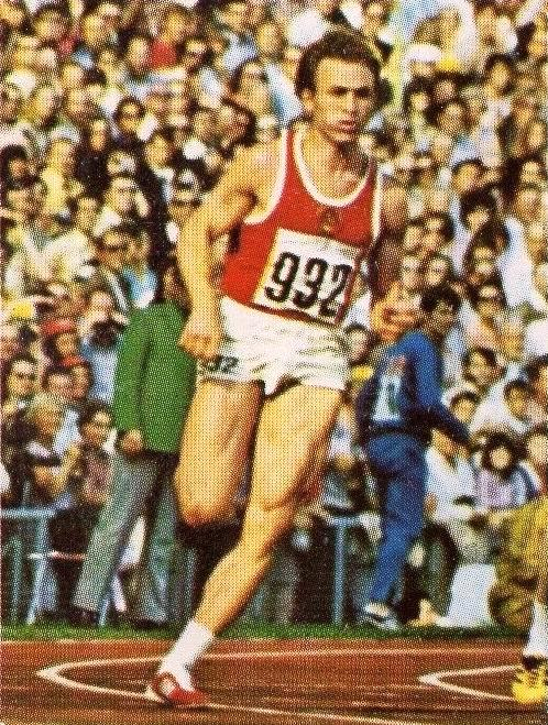 CAMPIONI dello SPORT 1973/74-Figurina n.5- BORZOV - URSS -ATL.LEGGERA